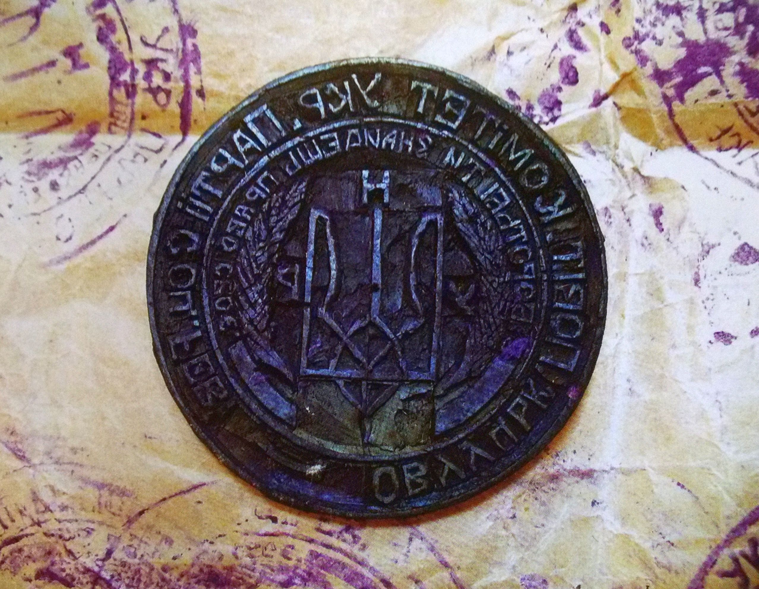 Печатка однієї з повстанських організацій Волинської повстанської армії